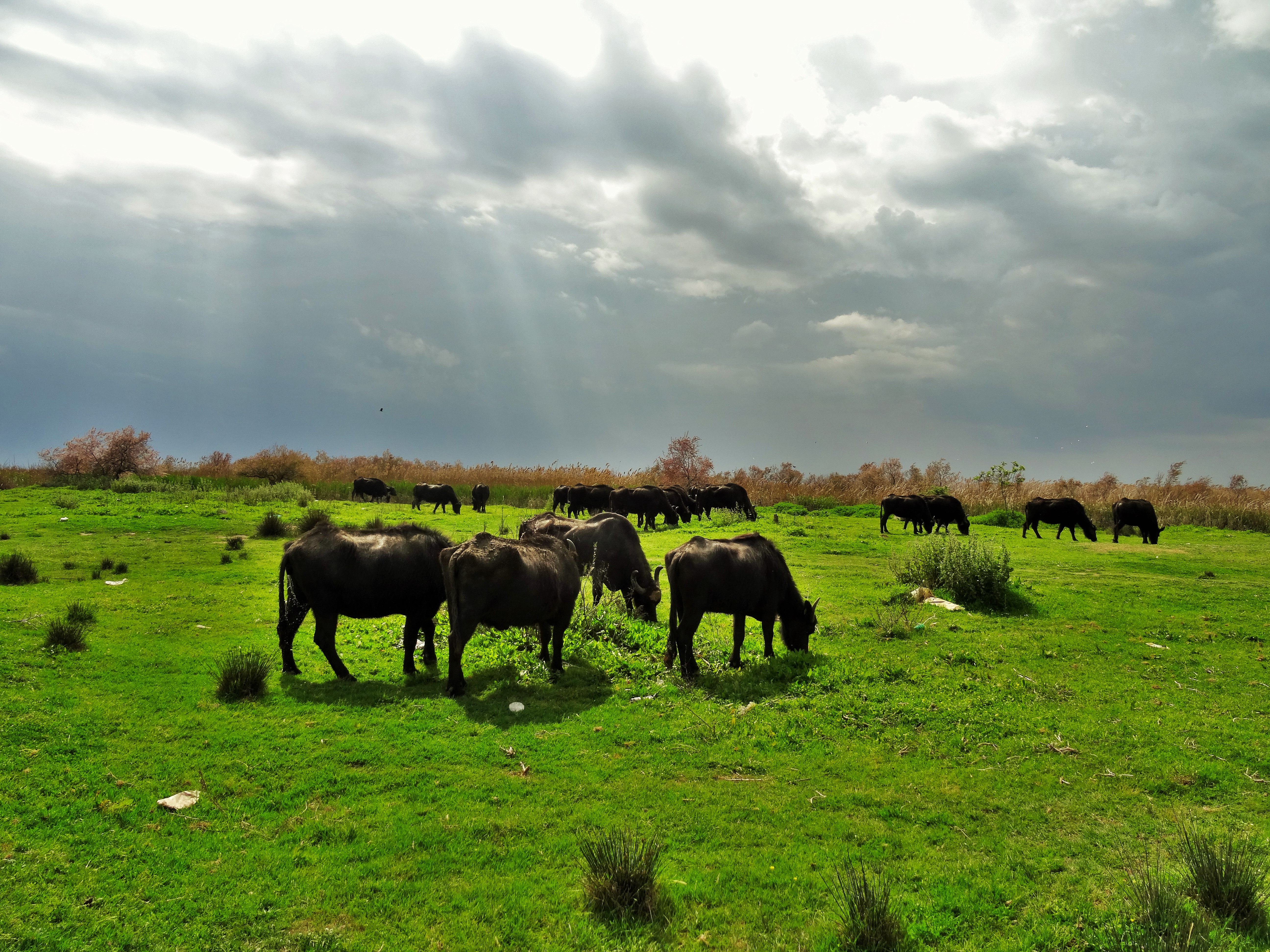 Νεροβούβαλοι/ Βούβαλοι/Εθνικό Πάρκο Δέλτα Αξιού/ Φώς/ Φυσικό τοπίο/ This is a photography of Natura 2000 protected area with ID GR1220002